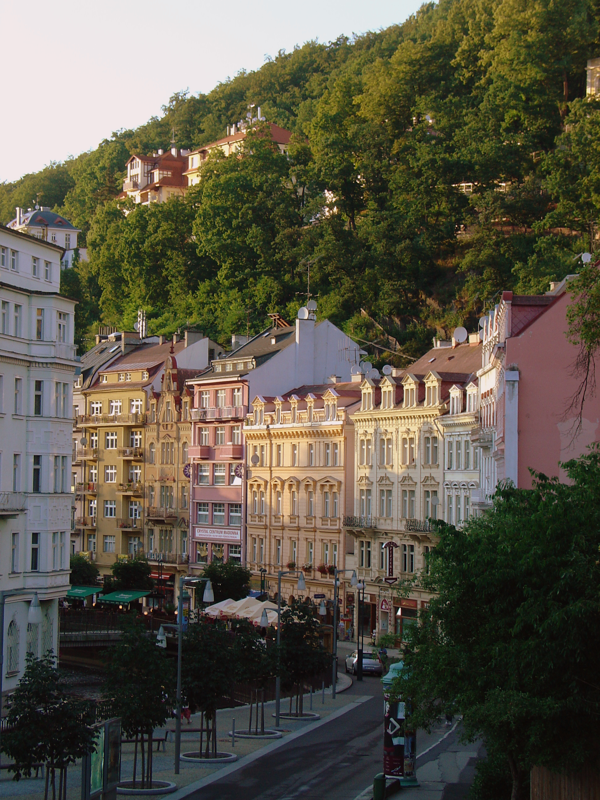 Rue Lázeňská, Karlovy Vary. République Tchèque